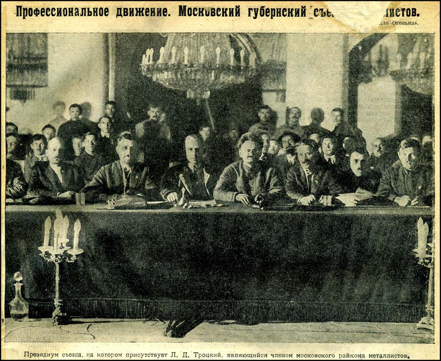 Президиум съезда, на котором присутствует Л. Д. Троцкий, являющийся членом московского райкома металлистов. Источник: Журнал "Огонек", 1923 год